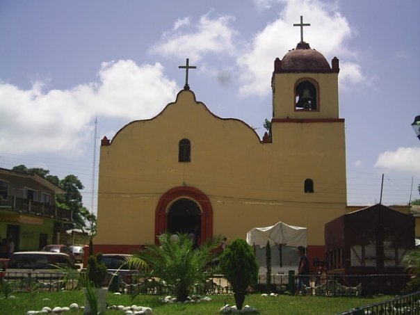 Parroquia de San Juan Huautla.